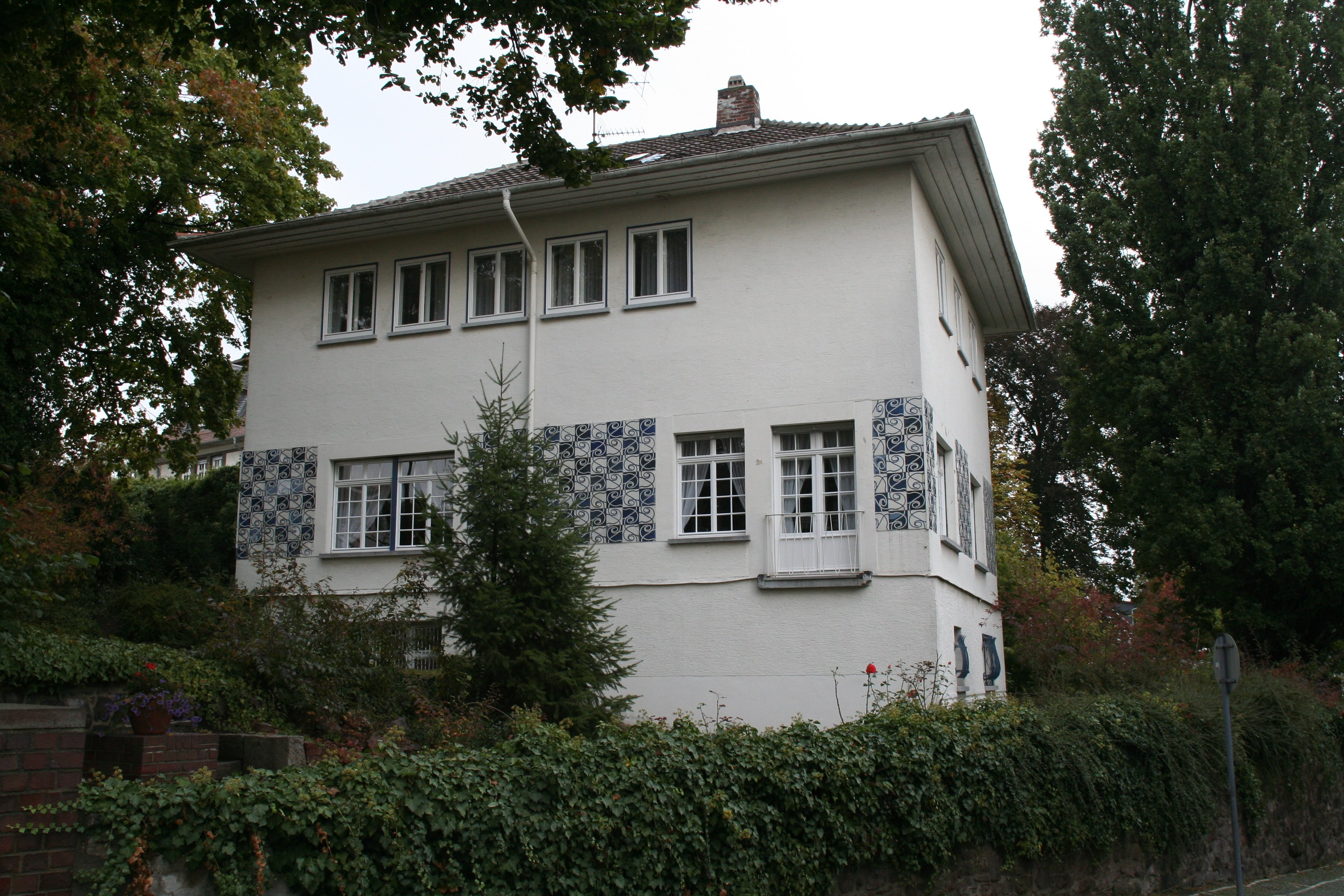 Haus Olbrich auf der Mathildenhöhe, Darmstadt (Germany)